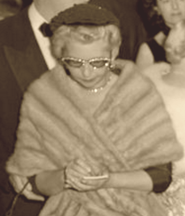 A jornalista de cinema Louella Parsons, durante a 28ª edição do Oscar, em 1956.